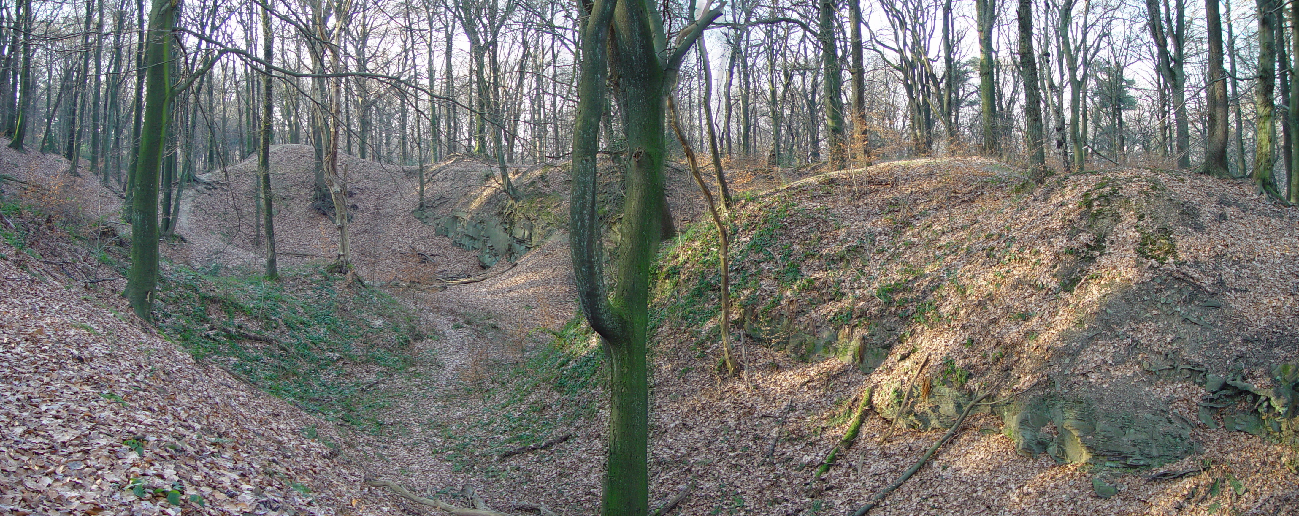 Steinbruch im Kothener Busch: Panorama